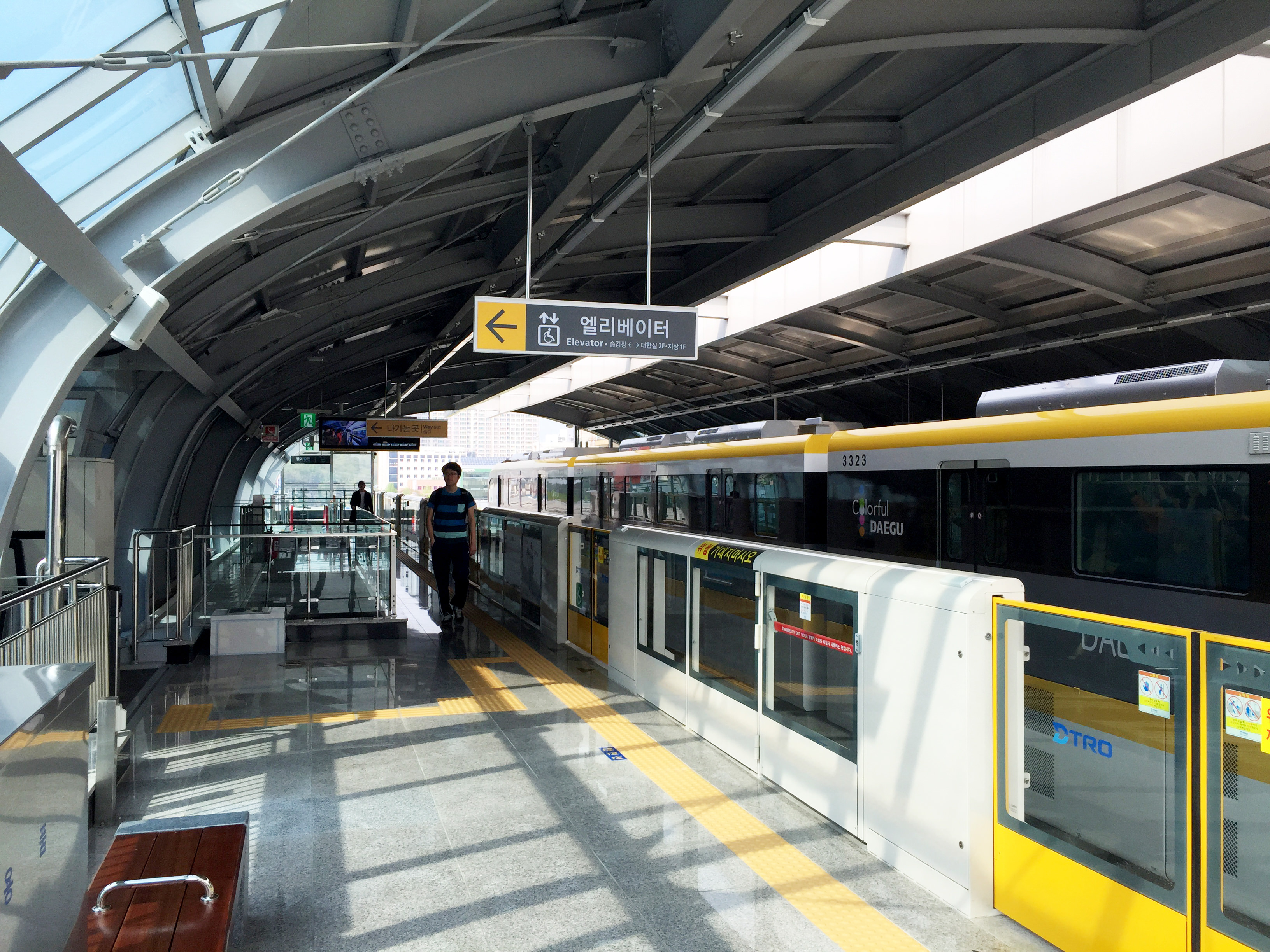 북구청역 승강장